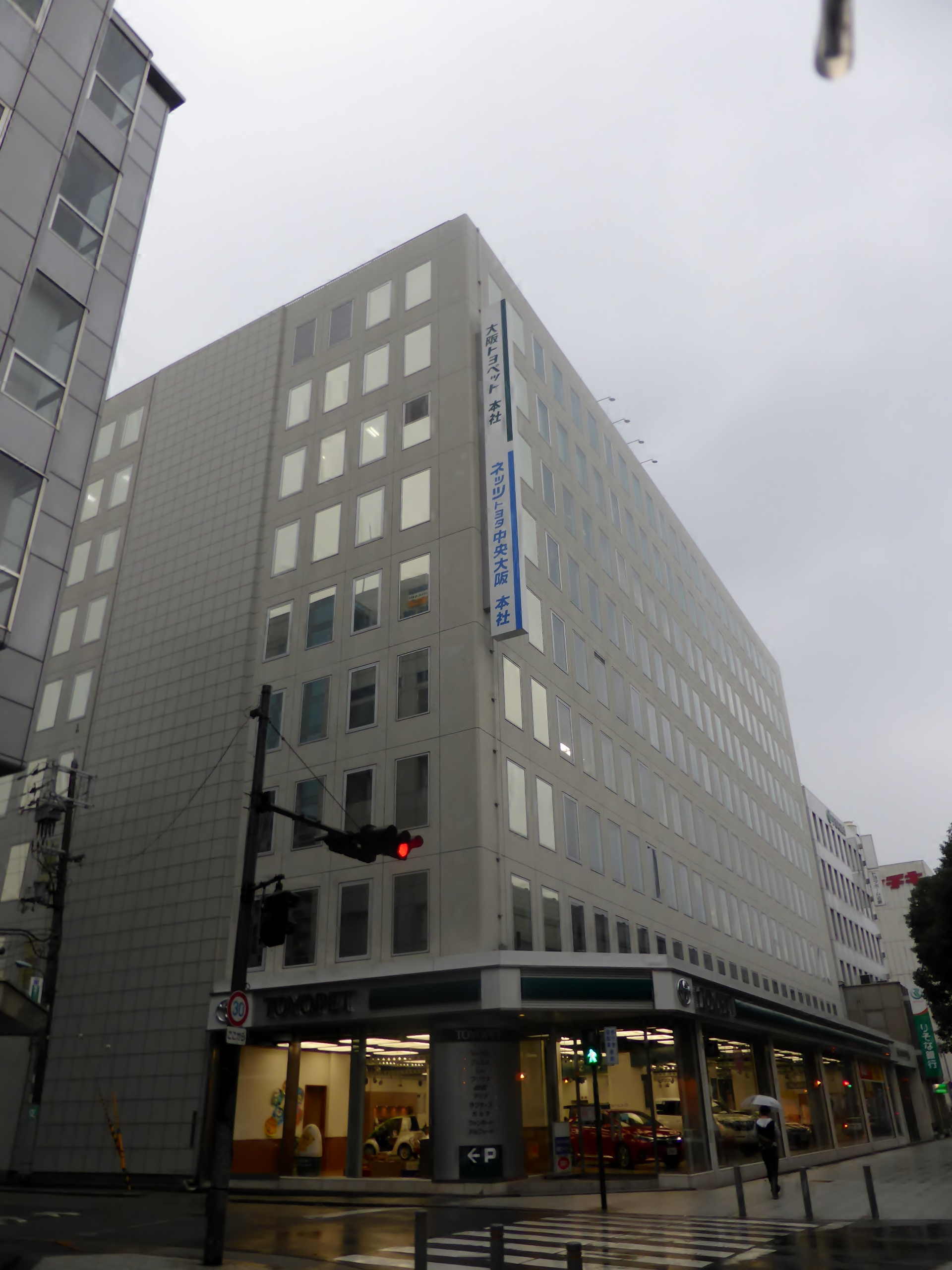 大阪トヨペット及びネッツトヨタ中央大阪の本社を撮影